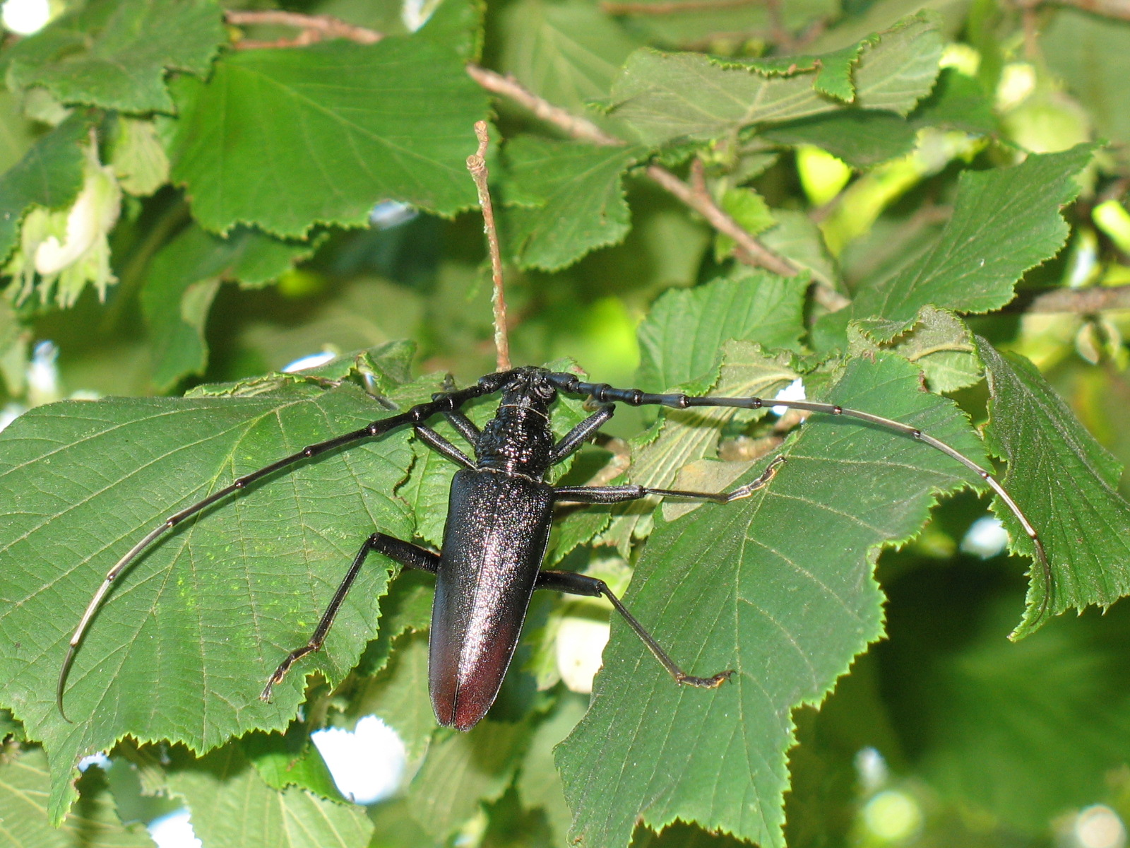 heldenbok Cerambyx cerdo male